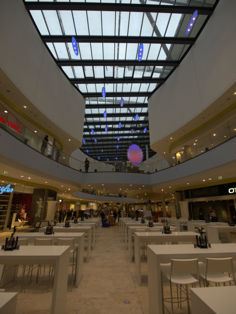 Die Rheingalerie am Tag der Eröffnung